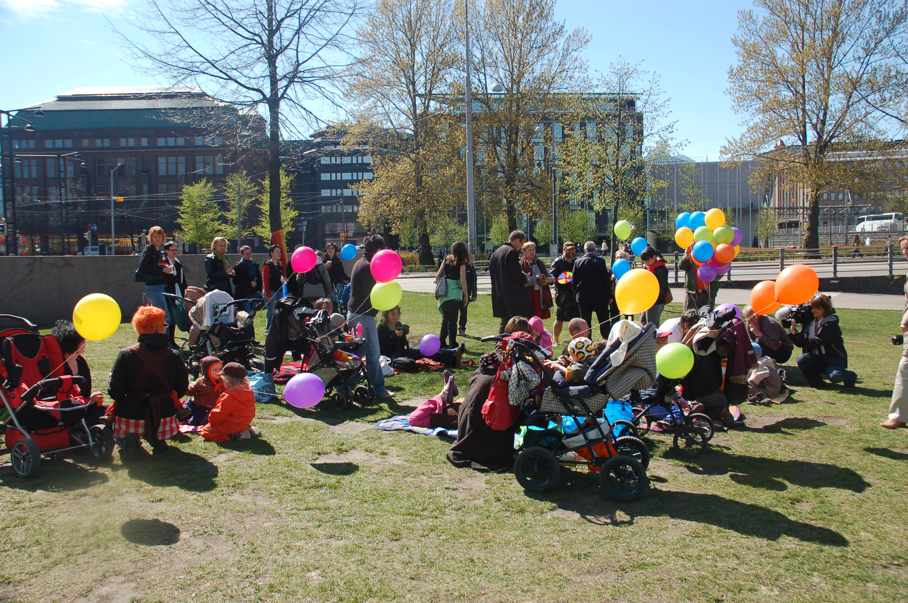 Veranstaltung von SETA (Seksuaalinen tasavertaisuus), einer LGBT-Gruppe, anlässlich der gesetzlichen Freigabe von Adoptionen für gleichgeschlechtliche Pärchen